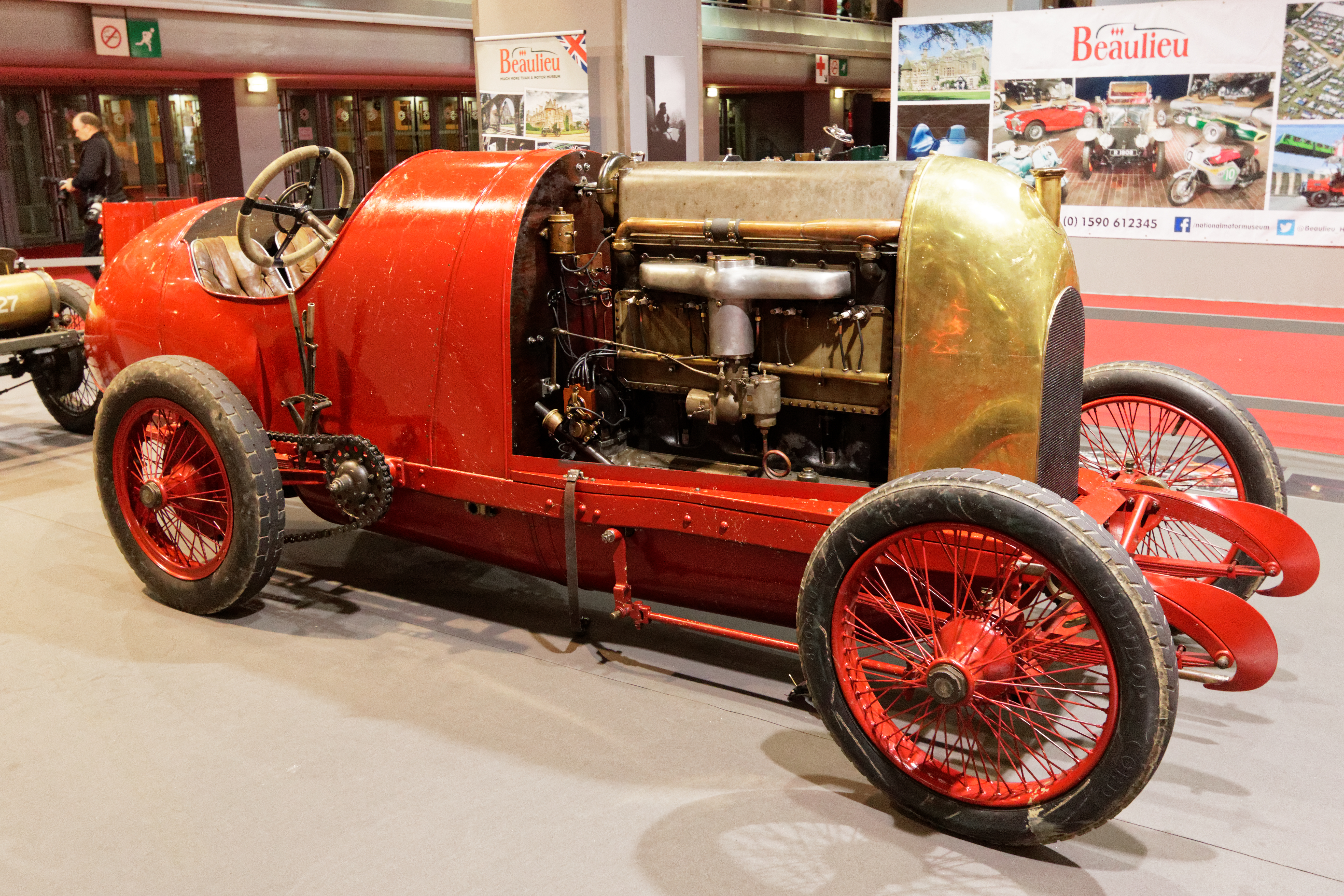 Une Fiat S 76 de 1911 exposée lors du salon Rétromobile 2016.